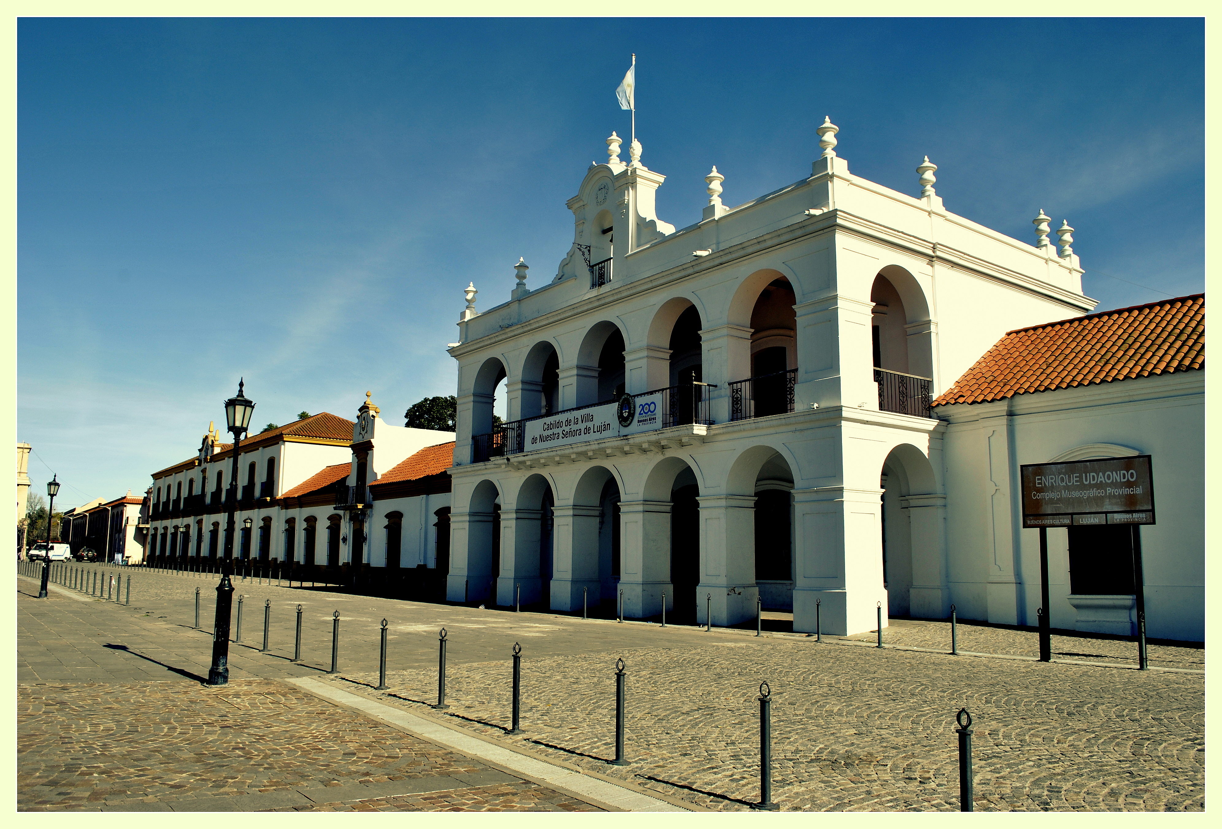 Fachada del Museo Histórico Colonial